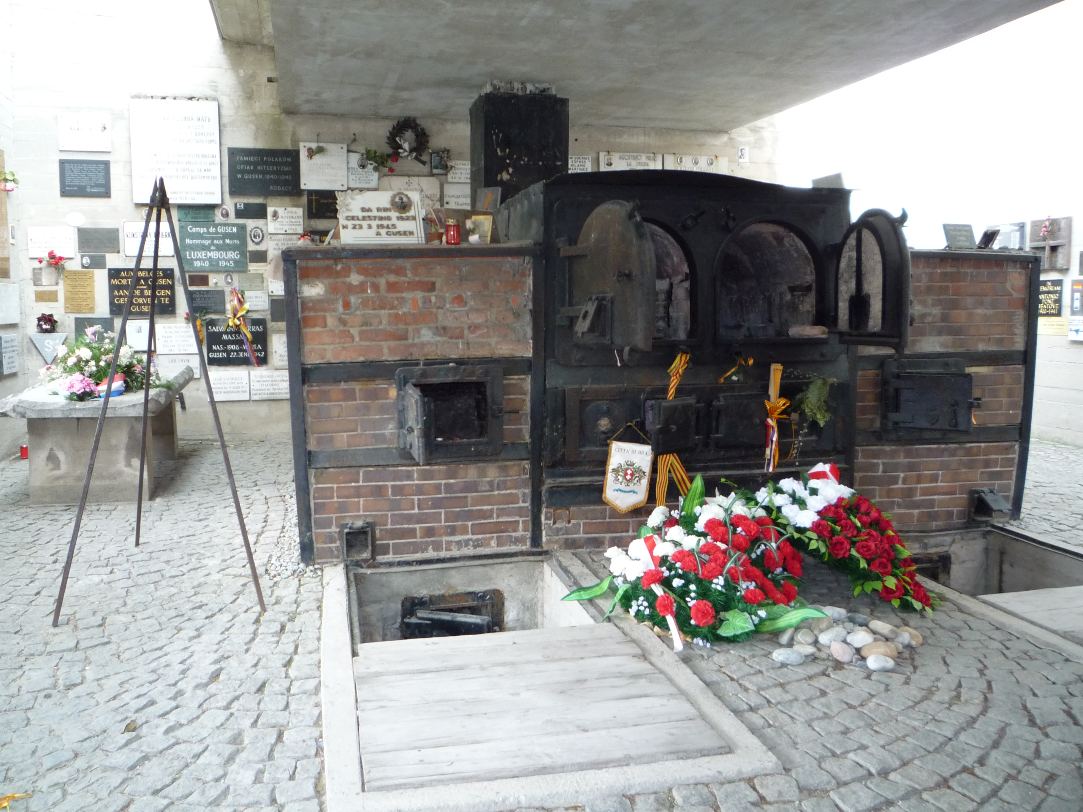 Ces fours crématoire se trouve dans le mémorial du camp de concentration de Gusen. Le mémorial a été construit autour des fours. A gauche des fours, se trouve une table en pierre qui servait essentiellement à arracher les dents en or des victimes après leurs décès.